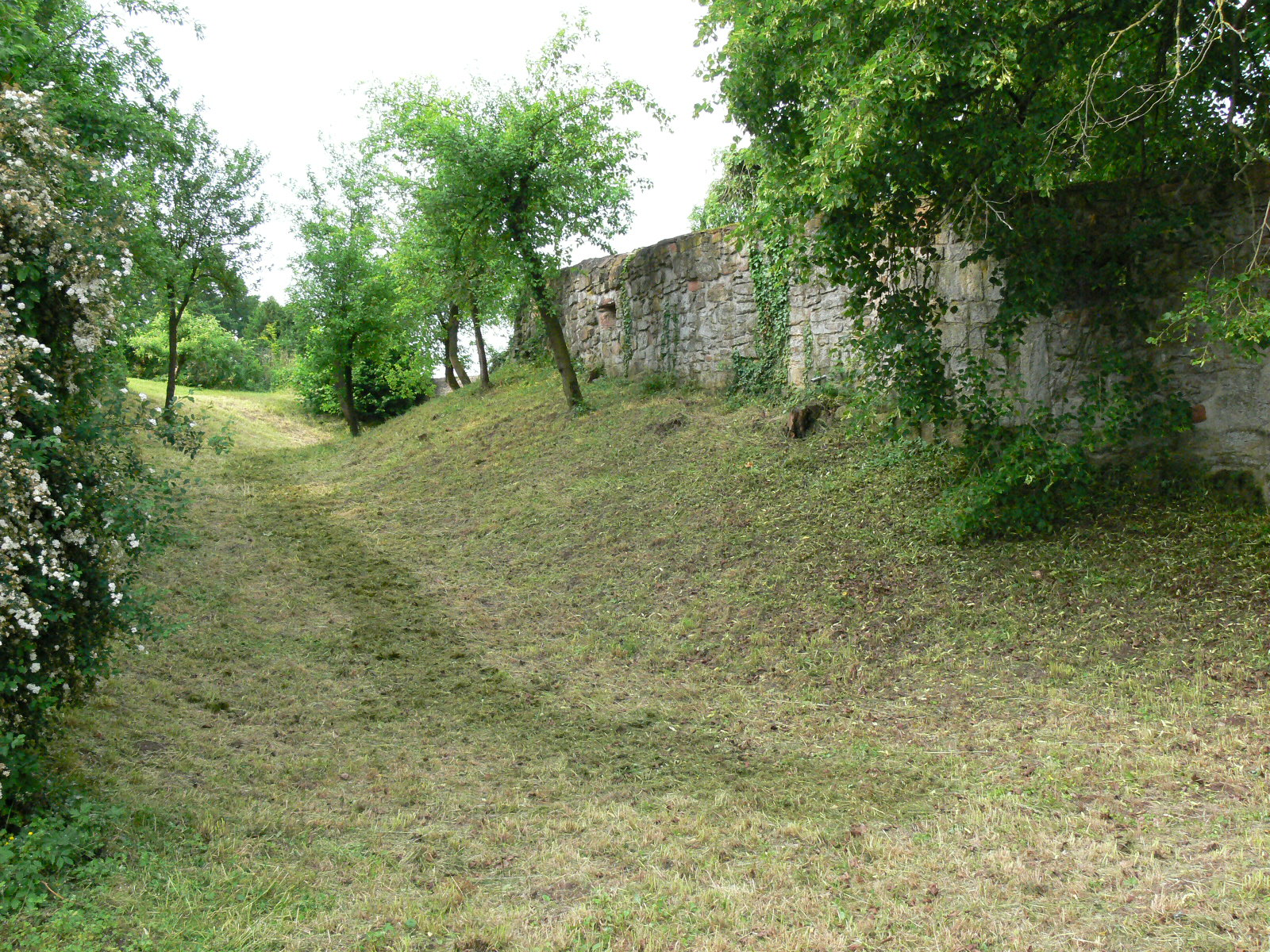 Reste des Wehrgrabens der ev. Kirche Fronhausen